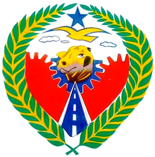 Brasão de Terezópolis de Goiás, Brasil.